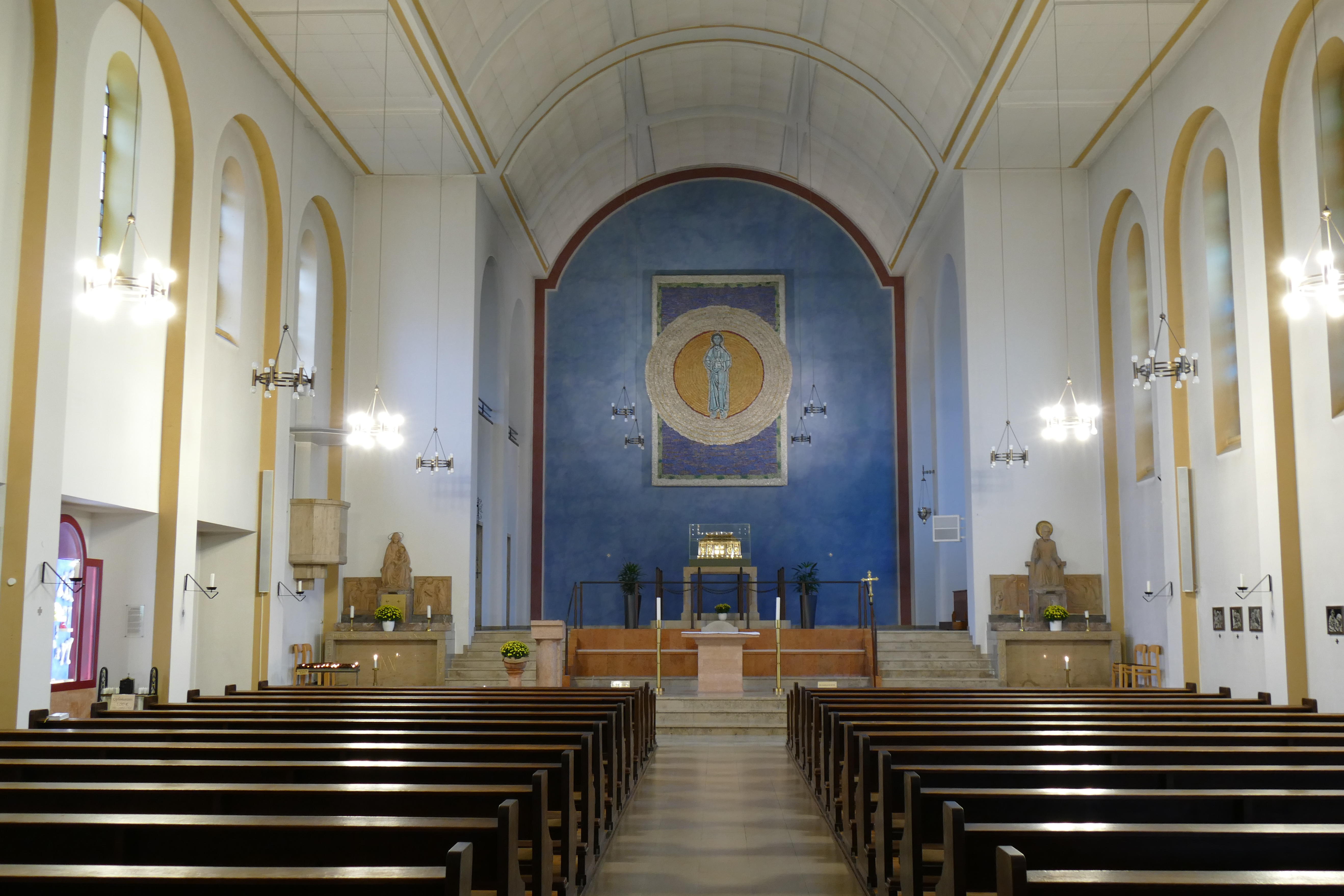 Pfarrkirche St Hildegard Eibingen Innenansicht